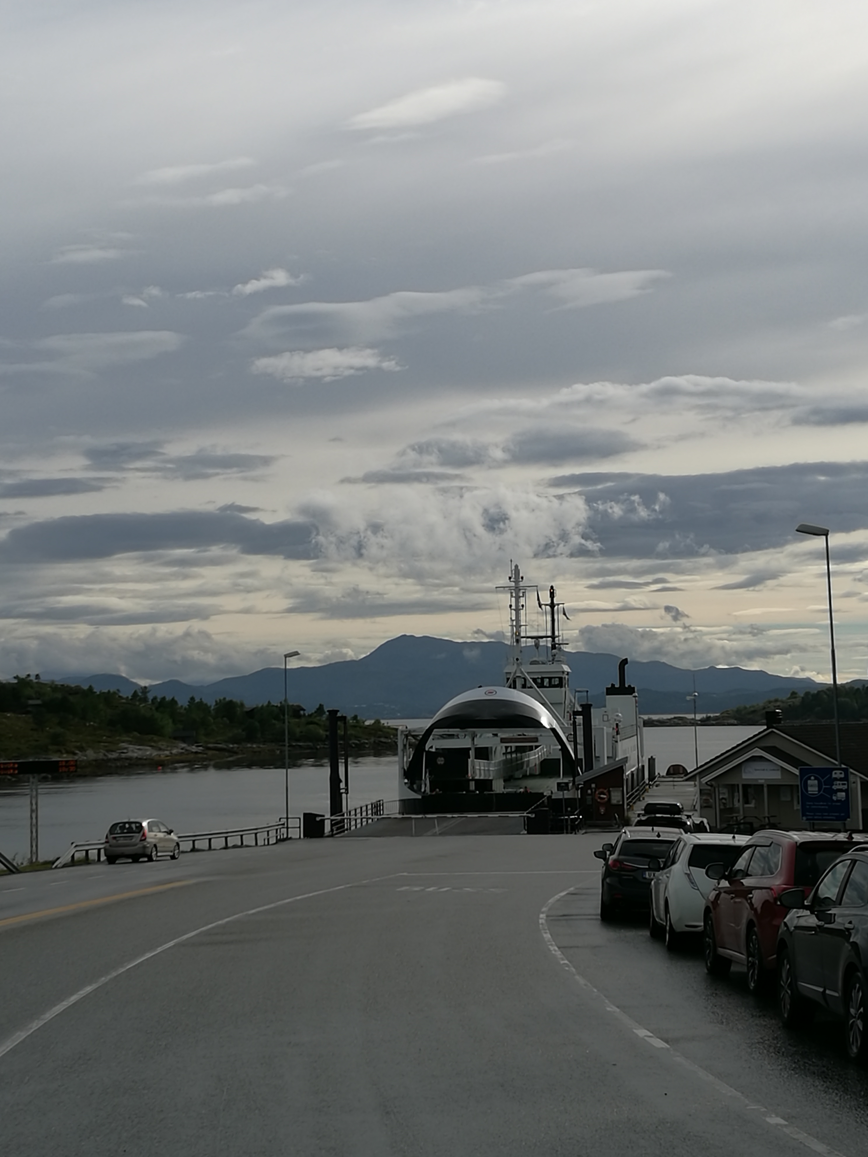 Tømmervåg ferjekai på Tustna på sambandet Seivika–Tømmervåg over Talgsjøen på Fylkesvei 680.